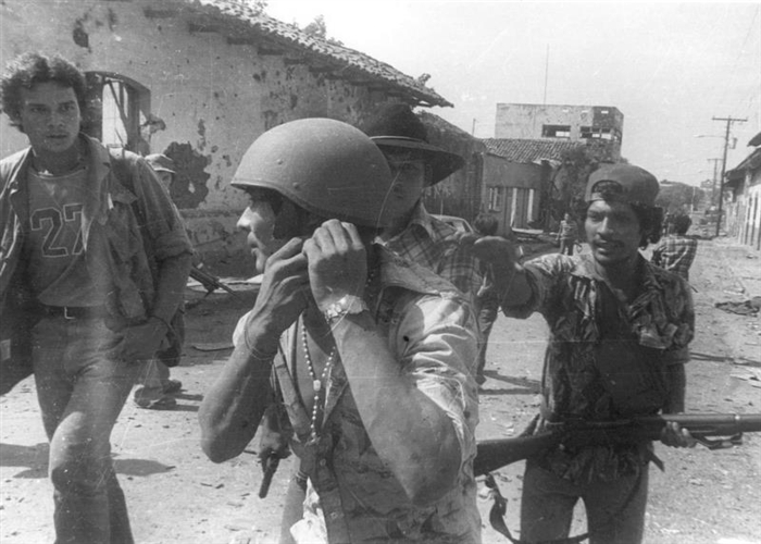 Junio-Julio 1979 Insurrección de León 1979 Imágenes de las acciones militares durante la insurrección de León y de la destrucción causada por los bombardeos de la Fuerza Aérea Nicaragüense (FAN) de la GN. durante los meses de junio y julio de 1979